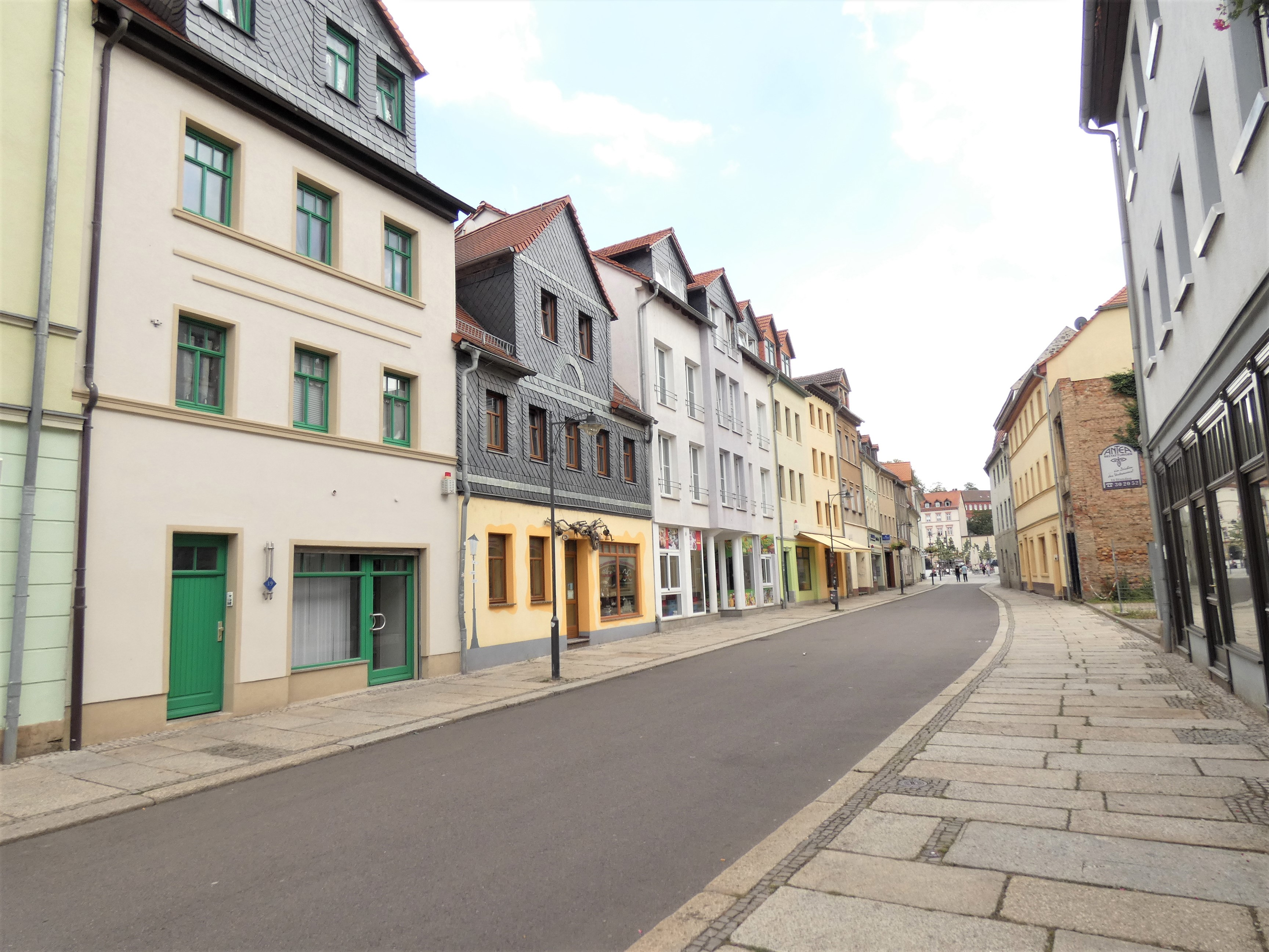 Kleine Kalandstraße in Weißenfels